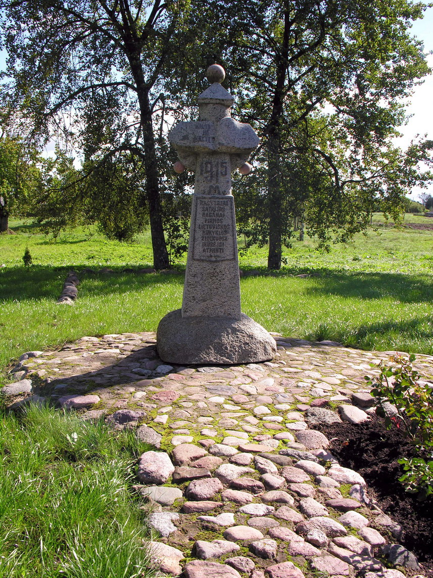 Židikai, Mažeikių raj. Paminklas rašytojai Marijai Pečkauskaitei-Šatrijos Raganai - pirmos lietuviškos mokyklos Židikuose įkūrėjai atminti, 1915 m. Foto: Algirdas, 2006 m. rugsėjo 9 d., Lietuva